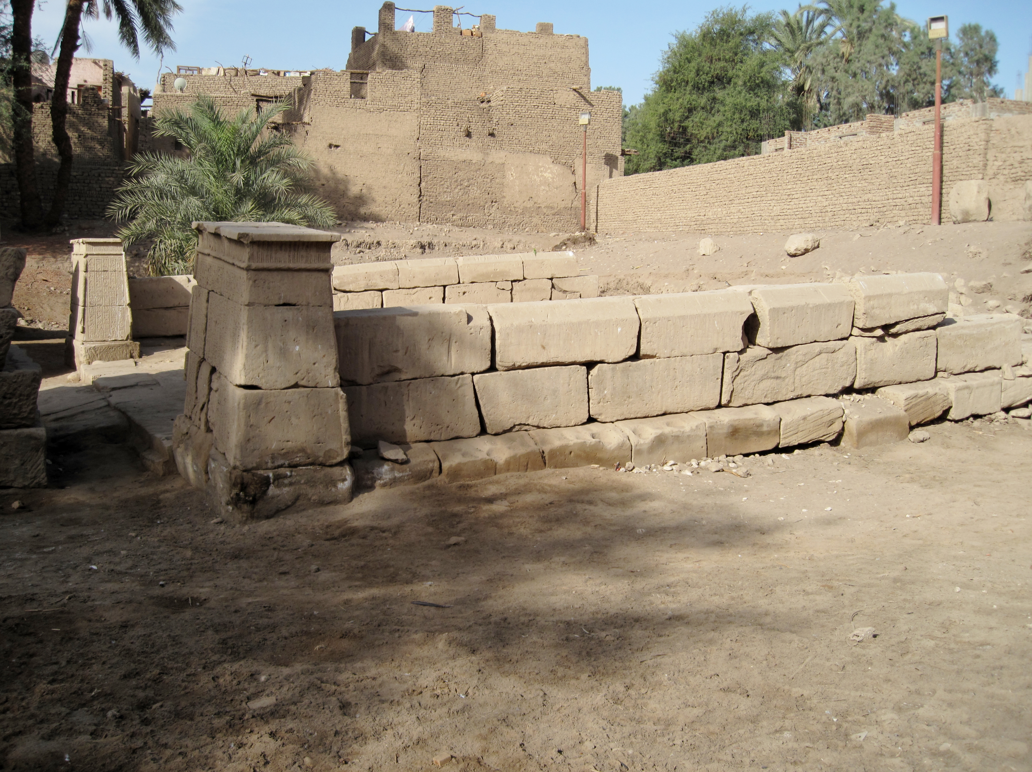 Kaianlage hinter dem Month-Tempel von el-Tod, Ägypten